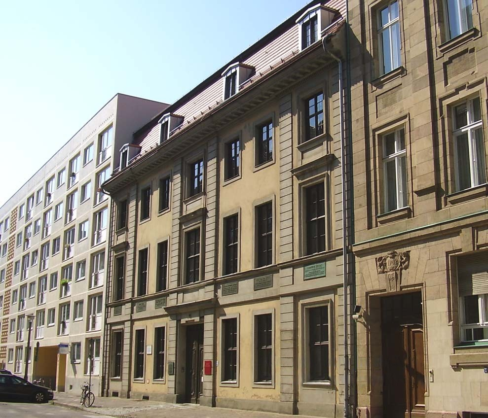 Nicolaihaus Berlin